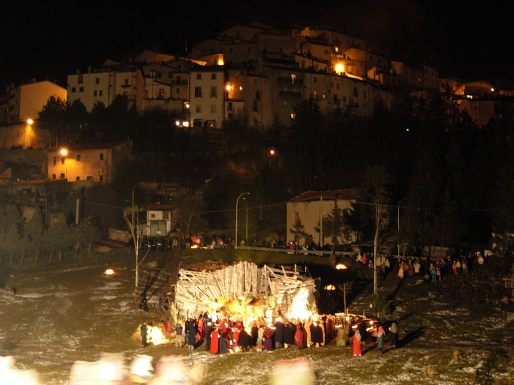 Presepe vivente di Rivisondoli Foto personale